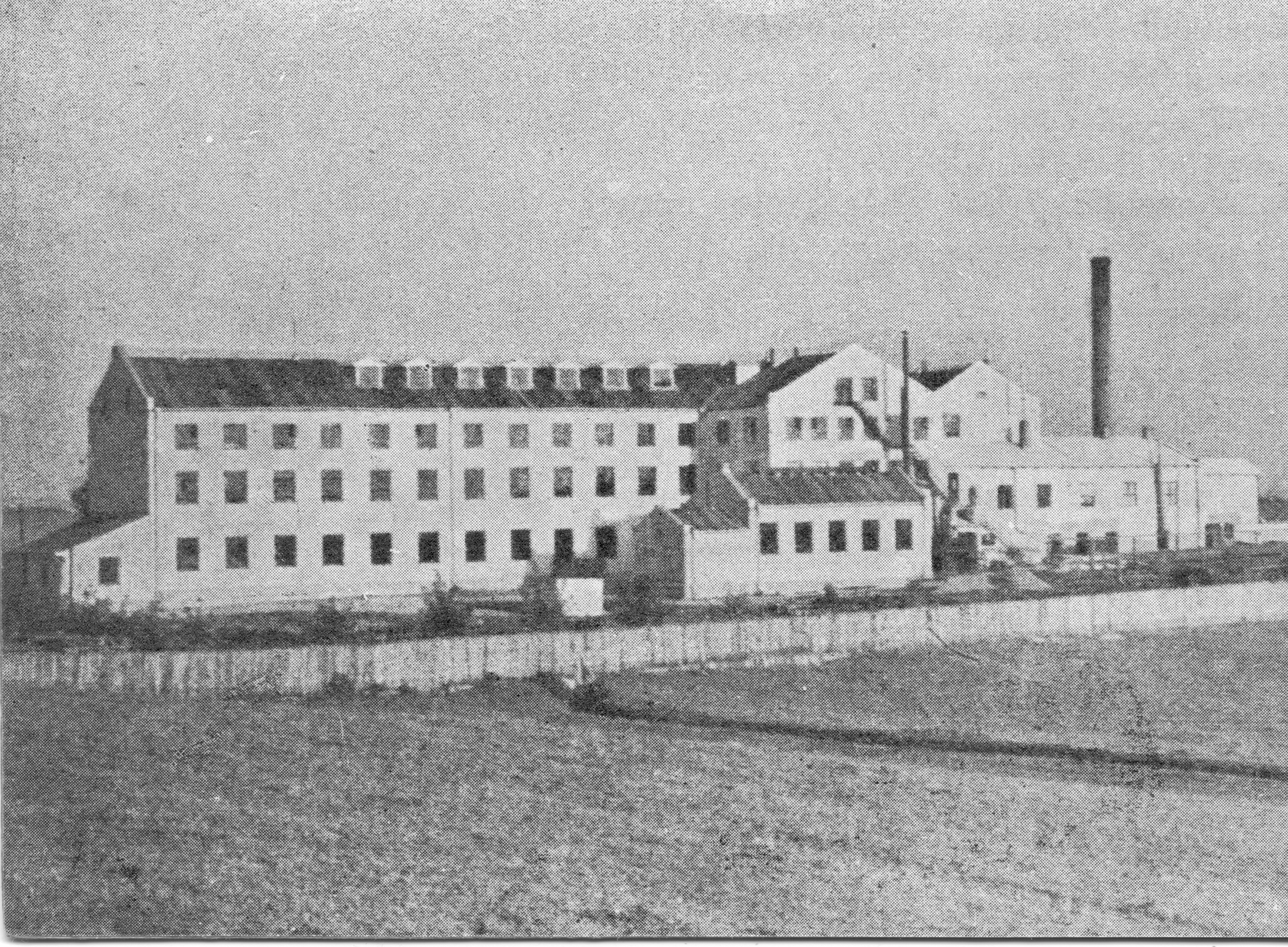 Nowa fabryka w Leszczkowie posiwięcona 1937 r.